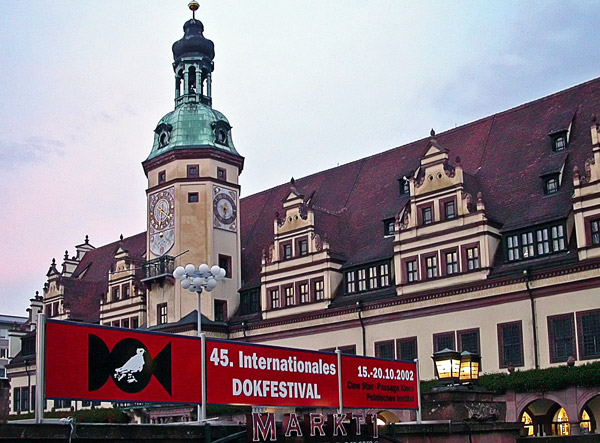 Werbetafeln des Internationalen Festivals für Dokumentar- und Animationsfilm Leipzig "DOK Leipzig", Ort: Markt Leipzig, Altes Rathaus